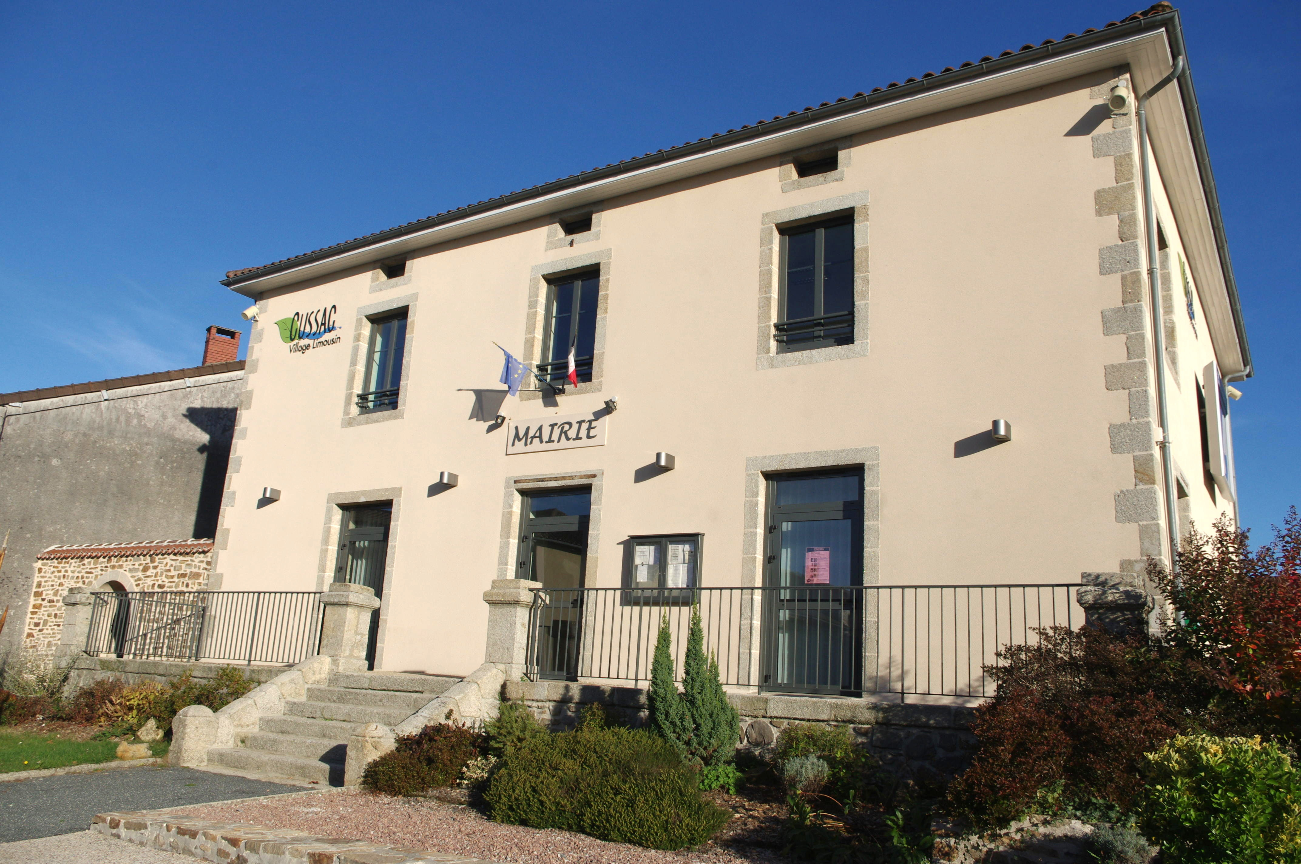 Mairie de Cussac, Haute-Vienne, France.